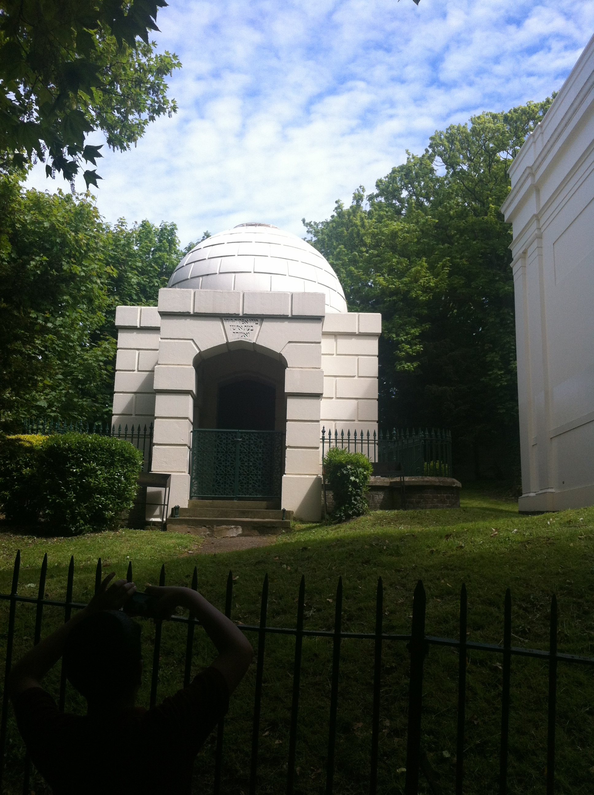 ציונם של ר משה מנטיפיורי ורעייתו בראמסגייט